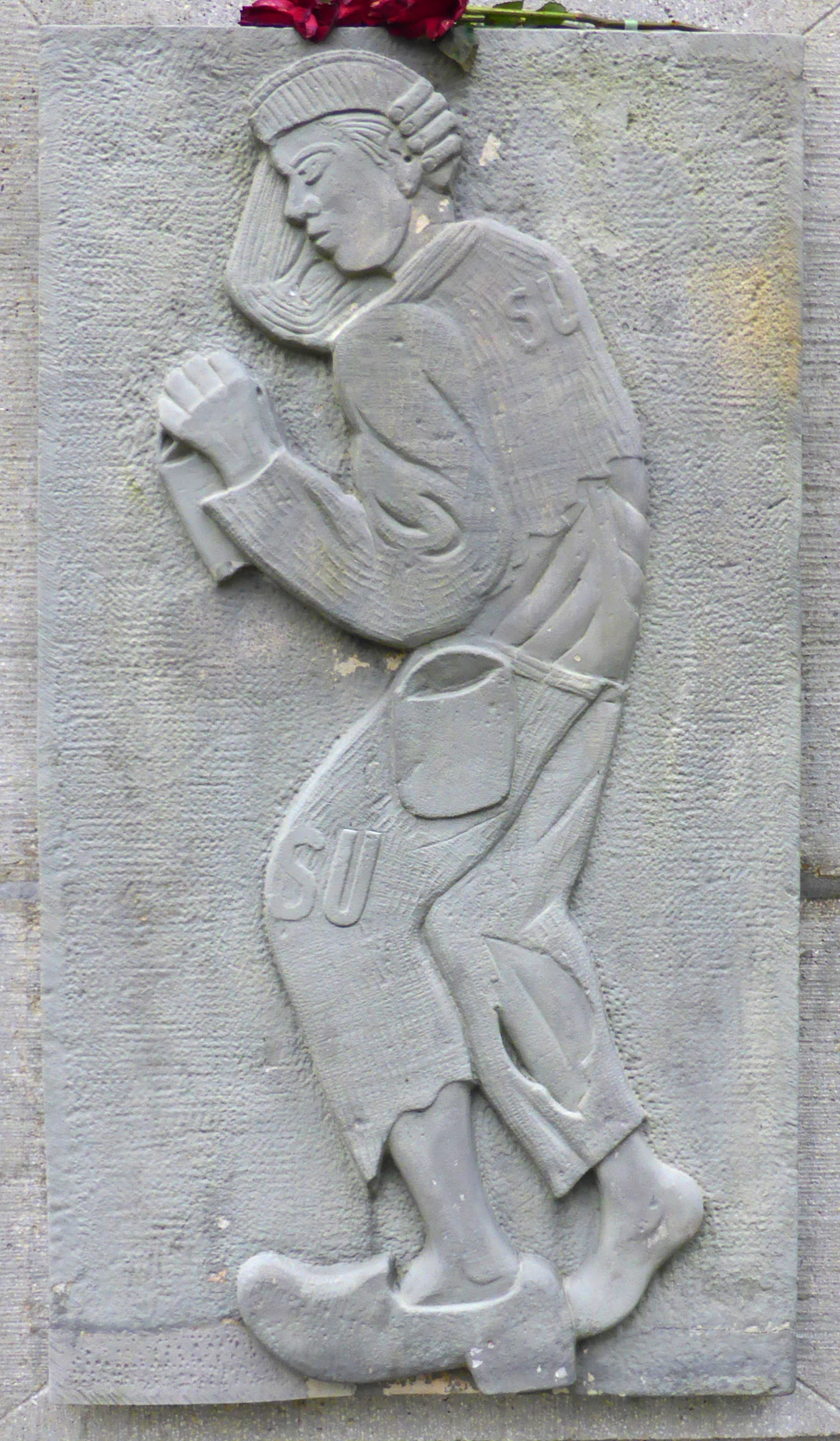 Relief auf dem sowjetischen Ehrenmal der Gedenkstätte für die Opfer der nationalsozialistischen Gewaltherrschaft in Wolfsburg, Stadtteil Tiergartenbreite.